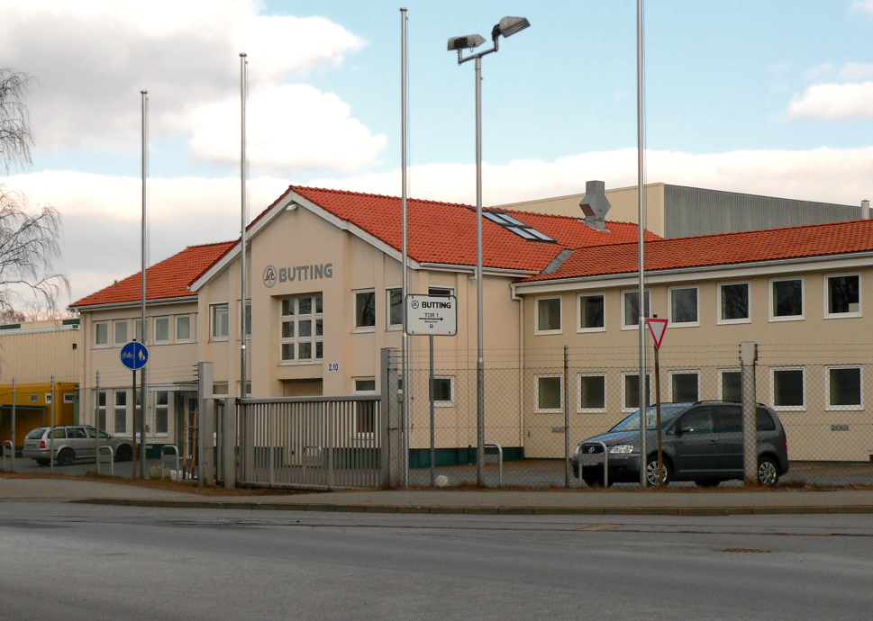 Sitz der Butting Gruppe in Knesebeck